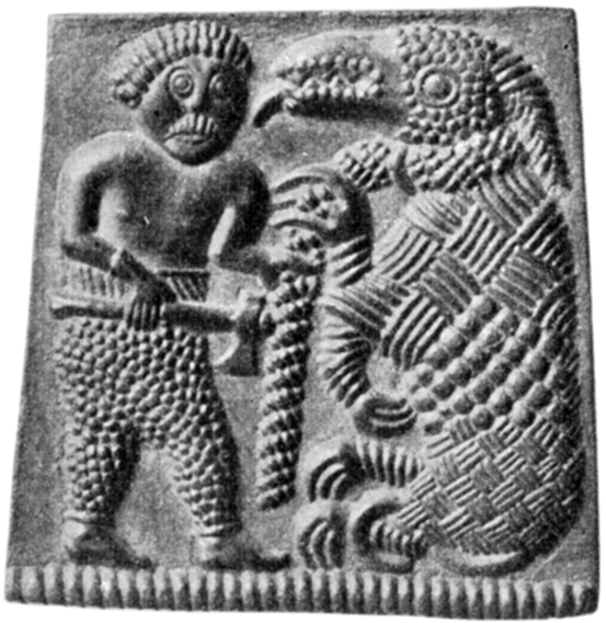 En hjälmbleckspatris med en yxkrigare och en kopplad varg från Björnhovda, Torslunda socken, Algutsrums härad, Mörbylånga kommun, Öland, Kalmar län, Sverige. Fig. 1 ur artikeln "Hjälmar och svärd i Beovulf" av Knut Stjerna ur en festskrift till Oscar Montelius utgiven 1903.